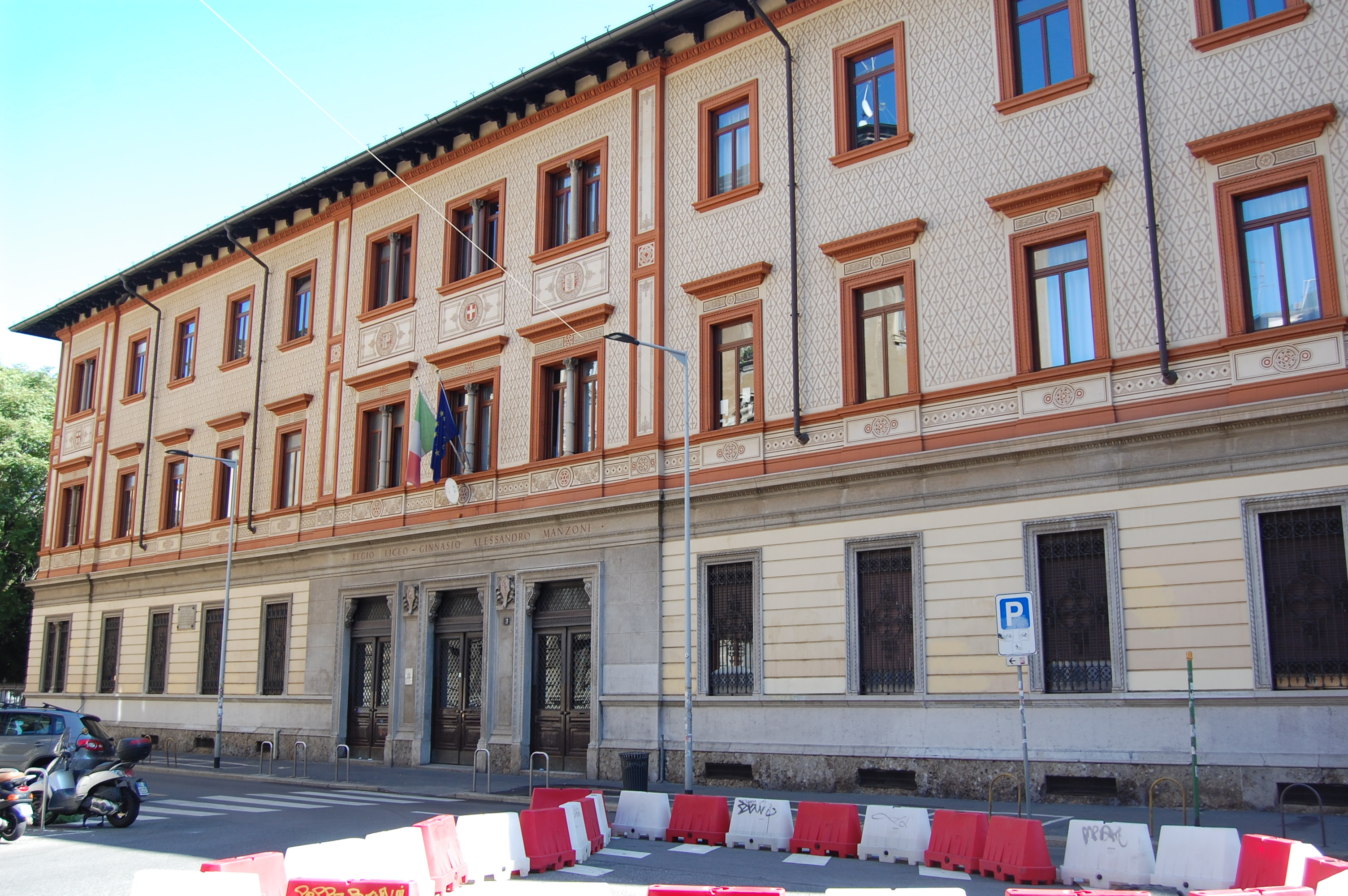 Il liceo classico Alessandro Manzoni di Milano visto da via Caminadella